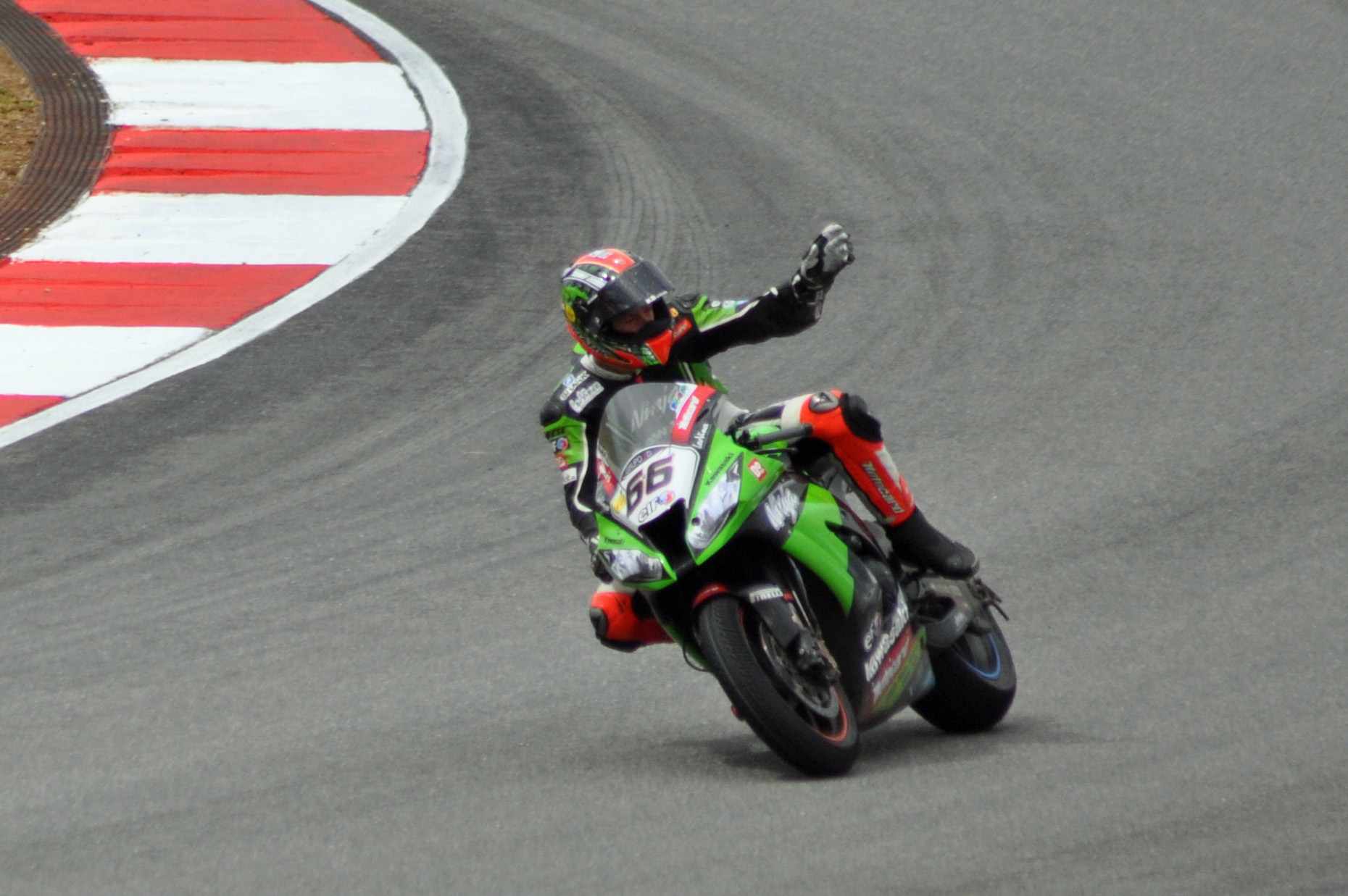 Autódromo Internacional do Algarve (2012-09-23), by Klugschnacker in Wikipedia (71) Tom Sykes (GBR) auf Kawasaki, auf der Ehrenrunde